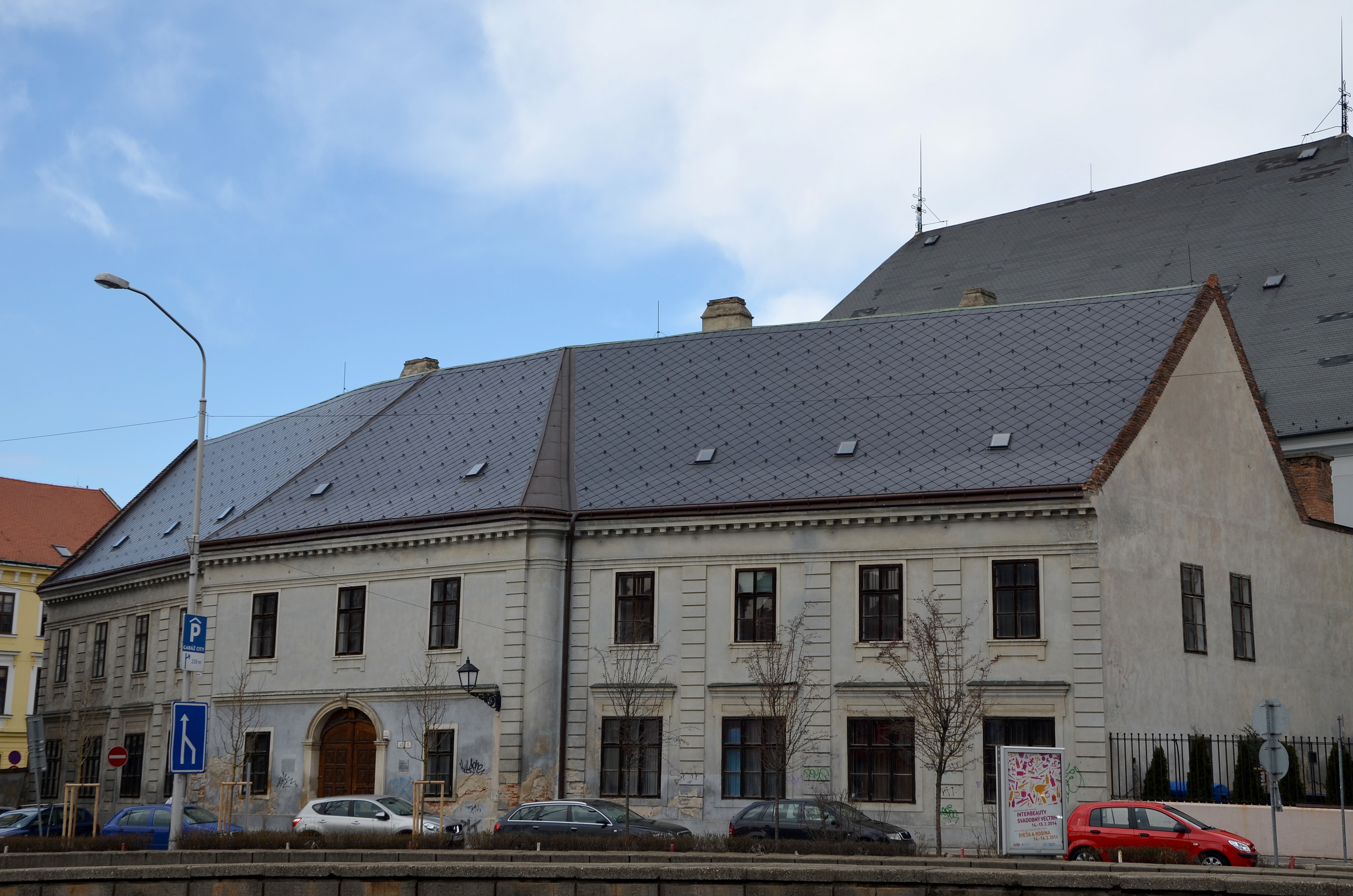 Celkový pohľad na komplex budov starého evanjelického lýcea